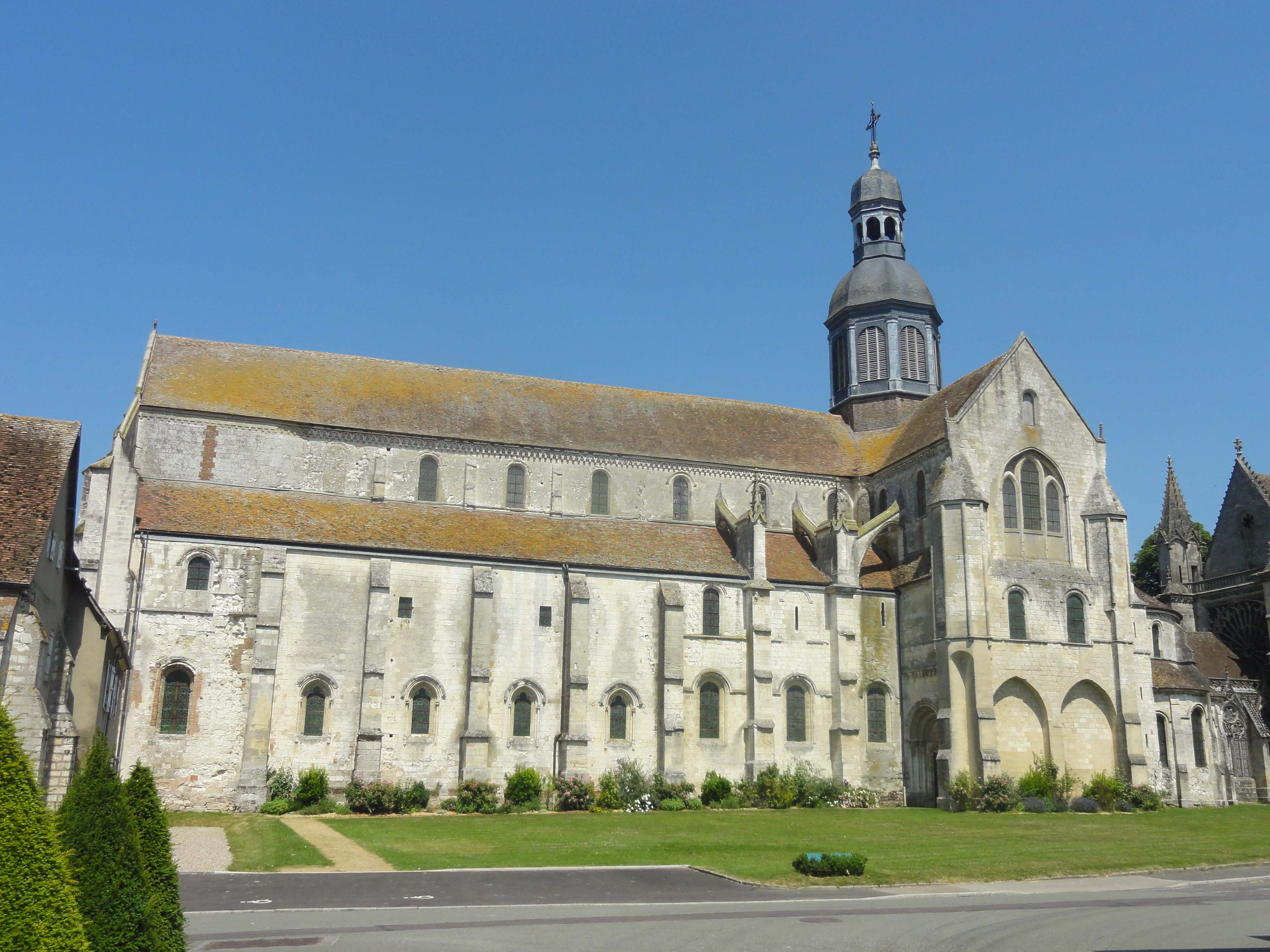 Église abbatiale Saint-Germer de l'ancienne abbaye Saint-Germer-de-Fly - voir le titre du fichier.